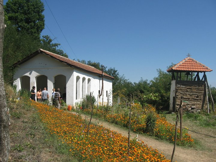 Srpski (latinica): Manastir Uspenije Presvete Bogorodice u Veti, manastirska crkva i zvonara